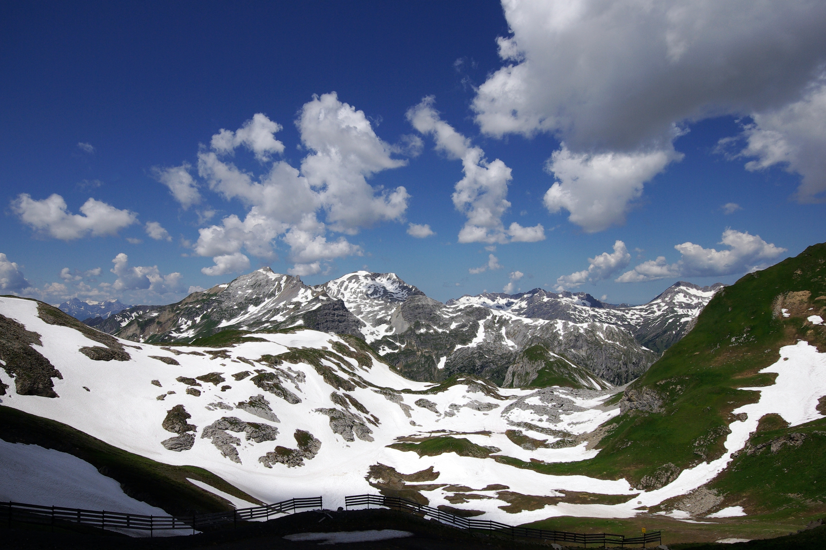 Blick vom Mahdloch Joch zum Spuller Schafberg (2.679 m)